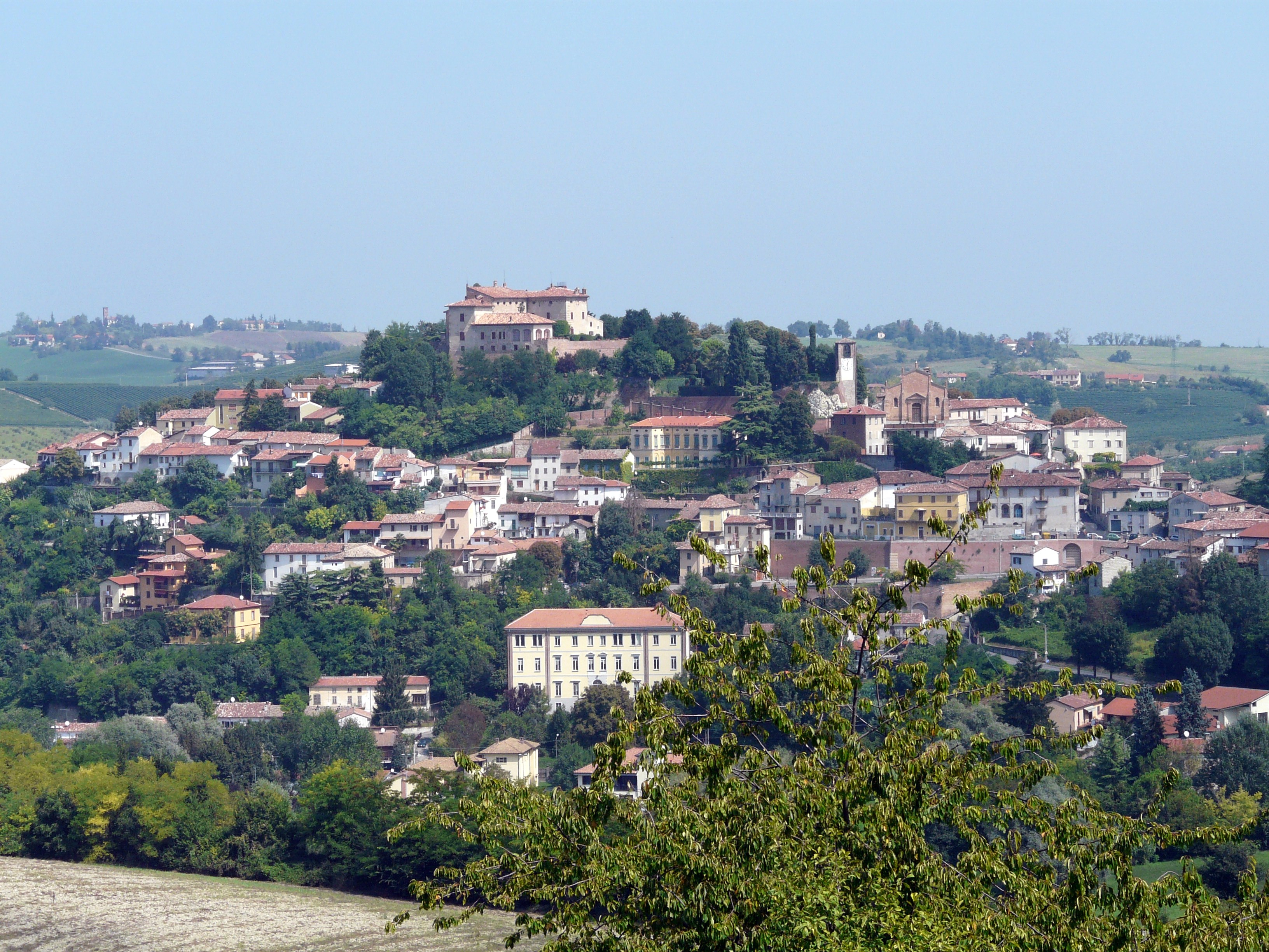 Ozzano Monferrato, Piemonte, Italia